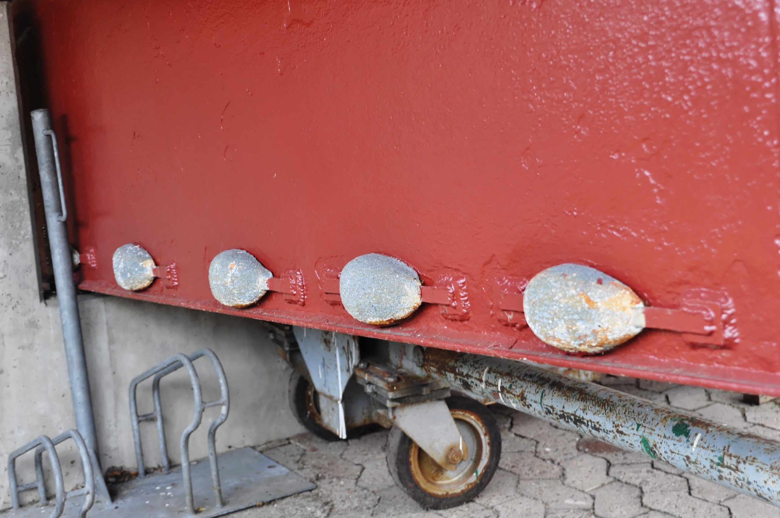 Bilder von der DGzRS in Bremen